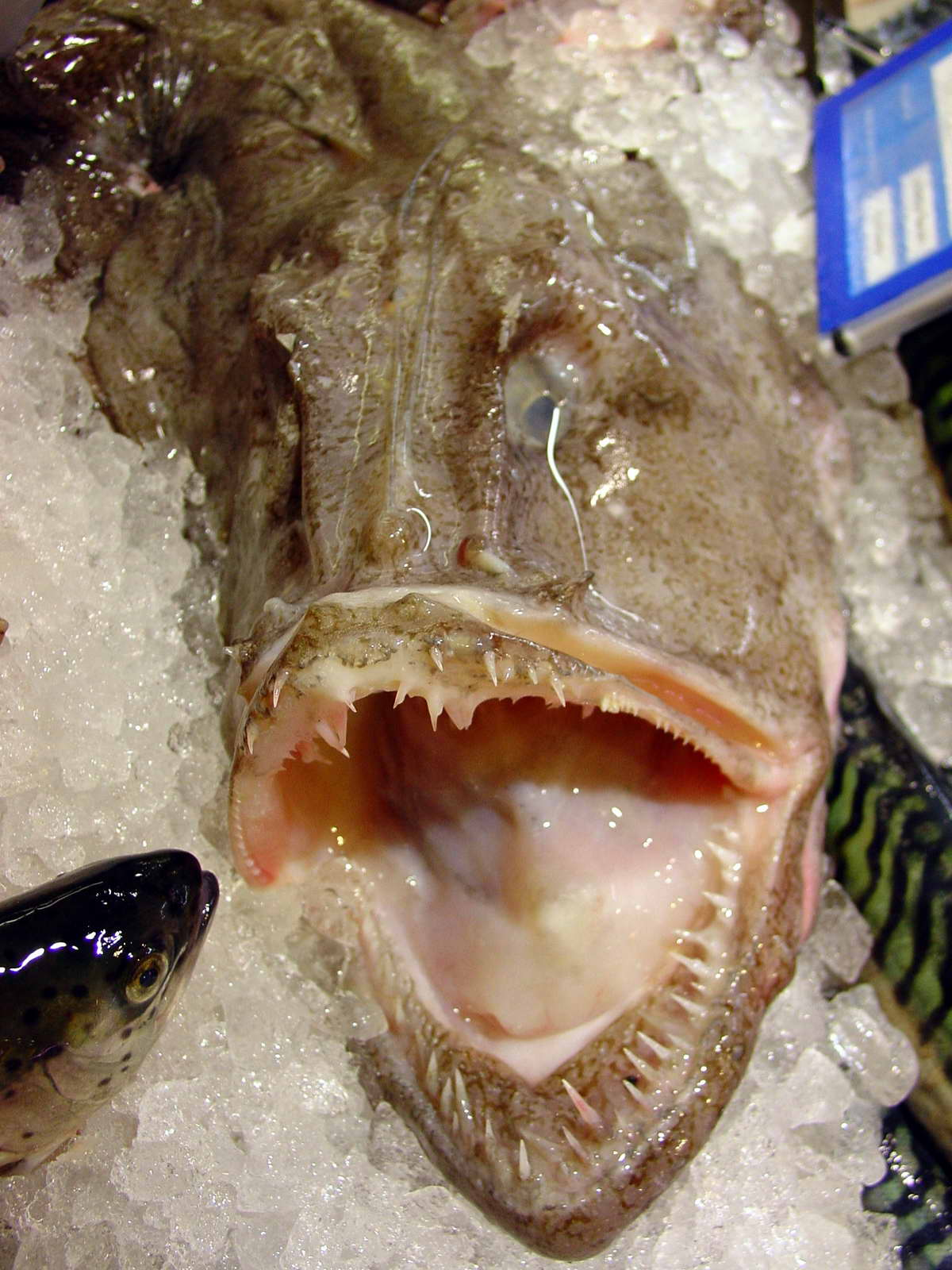 Rape, japuta. Teleósteo de la familia de los lófidos